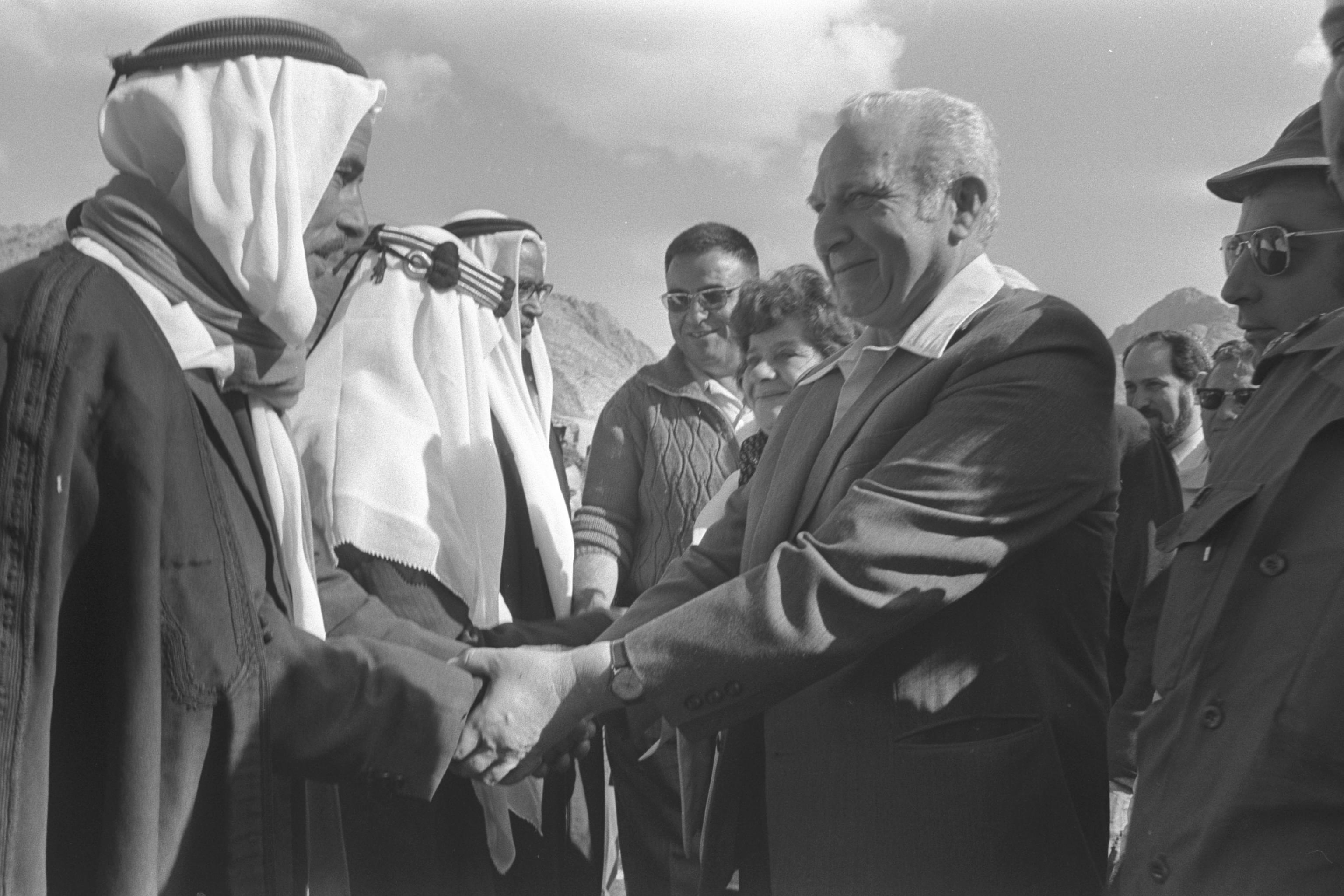 Pres. Katzir Shaking hands with one of the Bedouin sheikhs before the opening of the new field school at Santa Catherina (18/11/1974). נשיא המדינה אפרים קציר לוחץ יד לשייח בדואי, שבא לקבל את פניו בכניסה לבית ספר שדה בסנטה קתרינה, דרום סיני. Photo: ADLER MENAHEM.